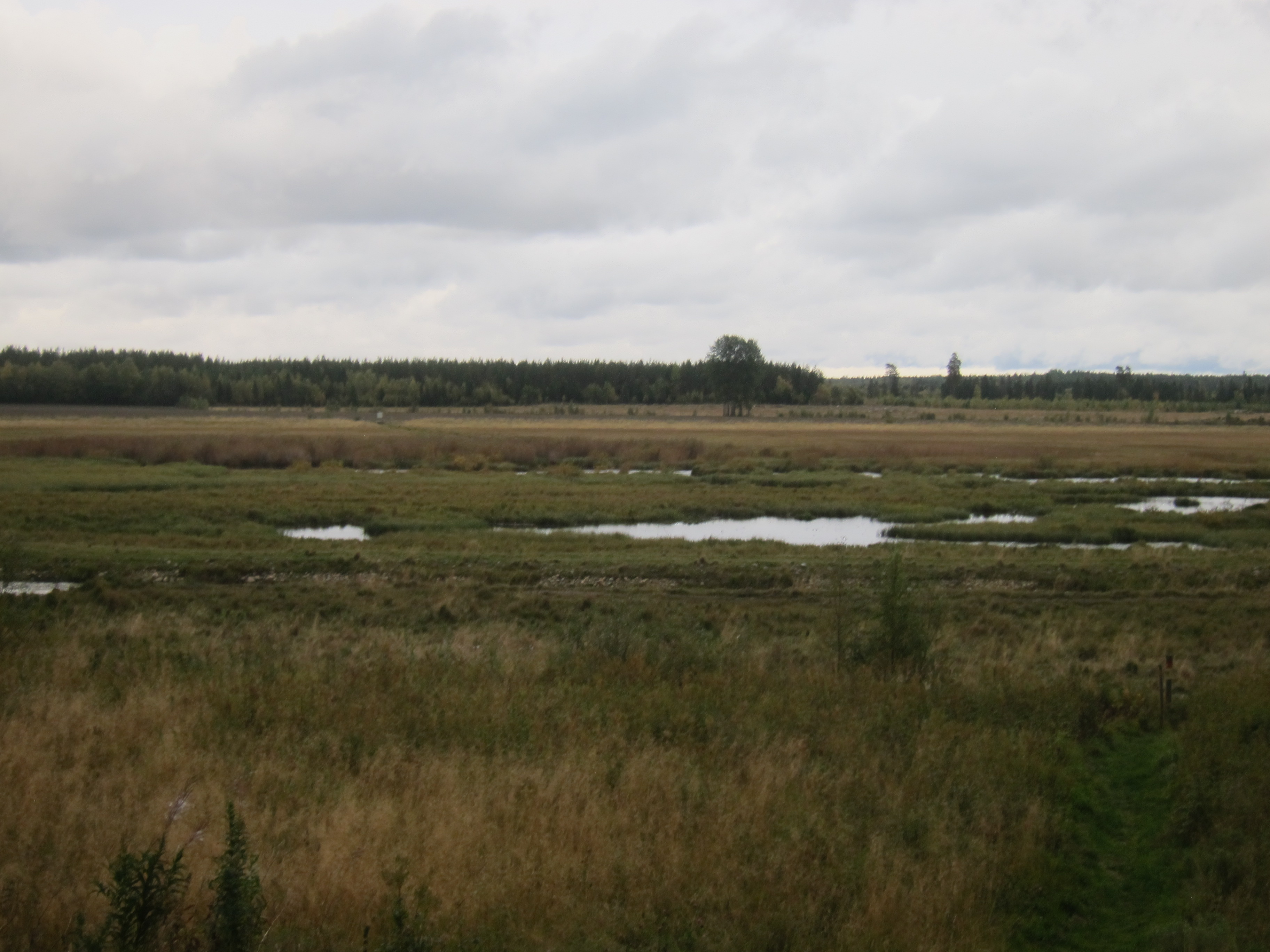 Storavans naturreservat.